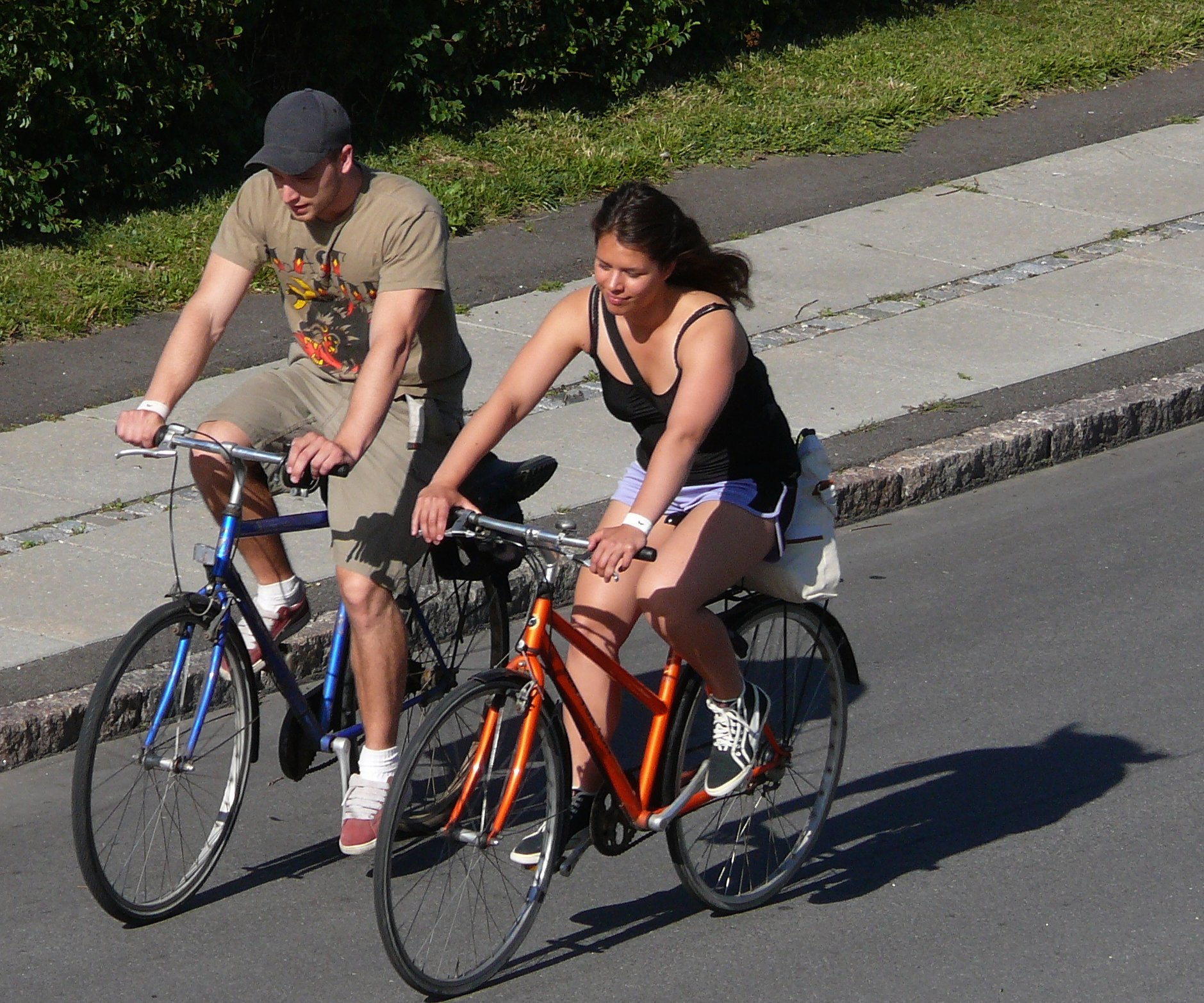 Venner på blå og orange